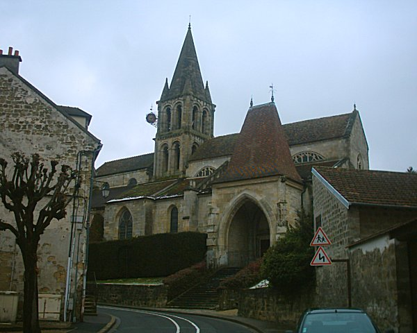 Eglise Notre Dame, Jouy-le-Moutier on 03/03/06.